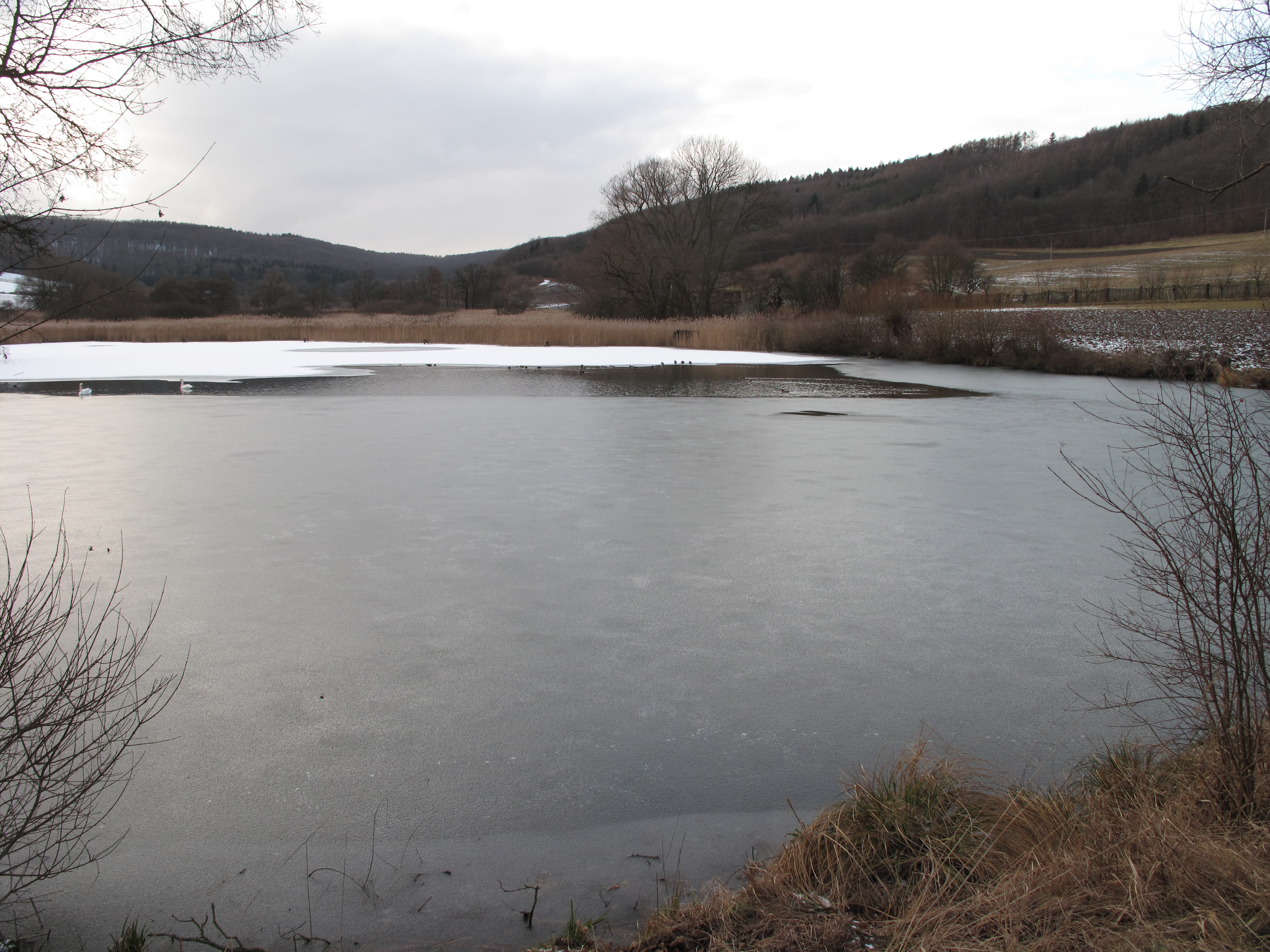 Rybník Jezero v přírodní památce Kalivody. Okres Rakovník, Česká republika.